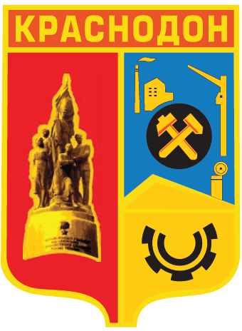 Автор герба міста Краснодона Рішенням Краснодонского міської ради №14/242 від 16.02.99р. затверджений герб м. Краснодона